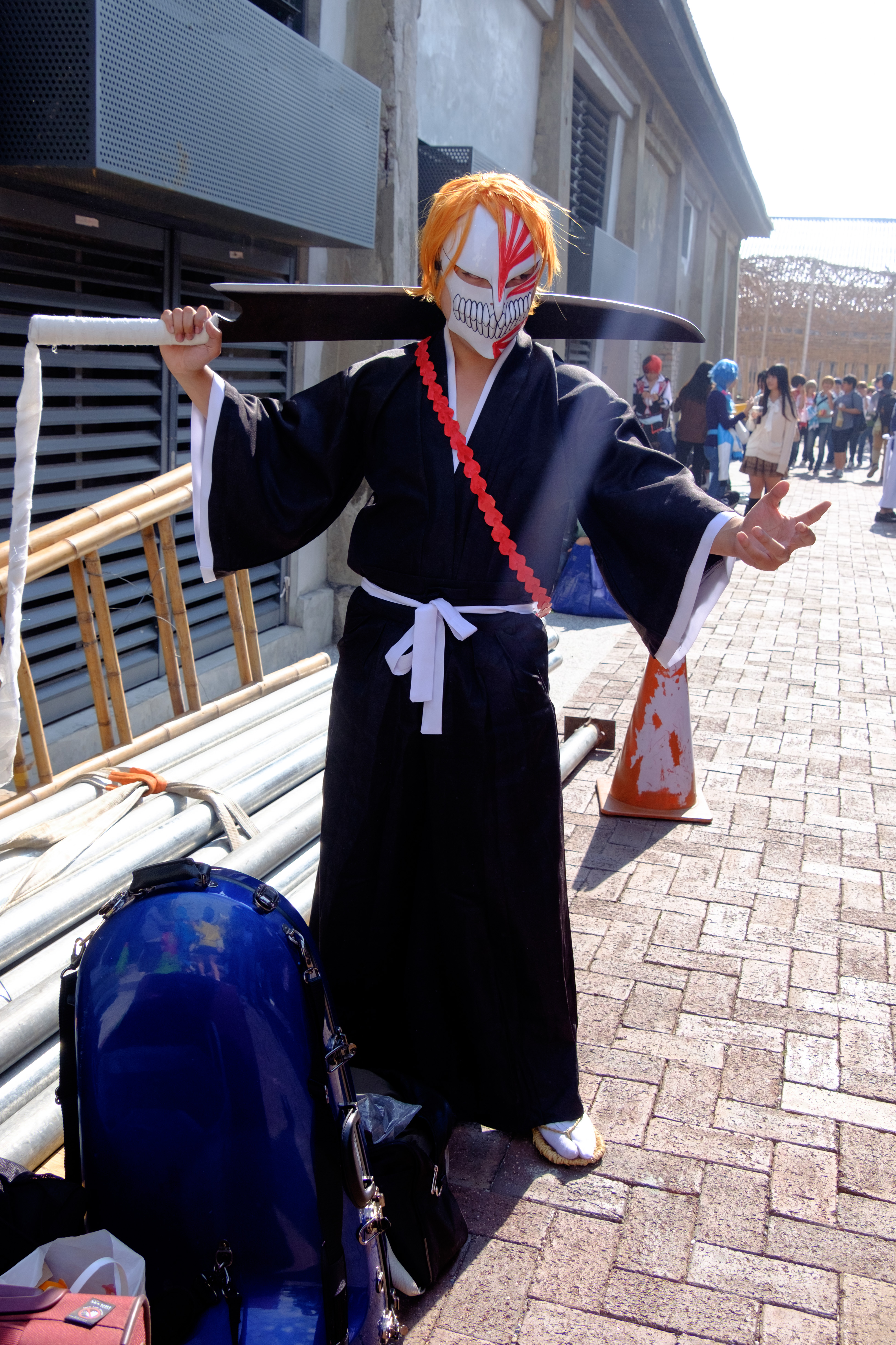 2015駁二動漫祭第二日下午，＜Bleach＞黑崎一護cosplayer。